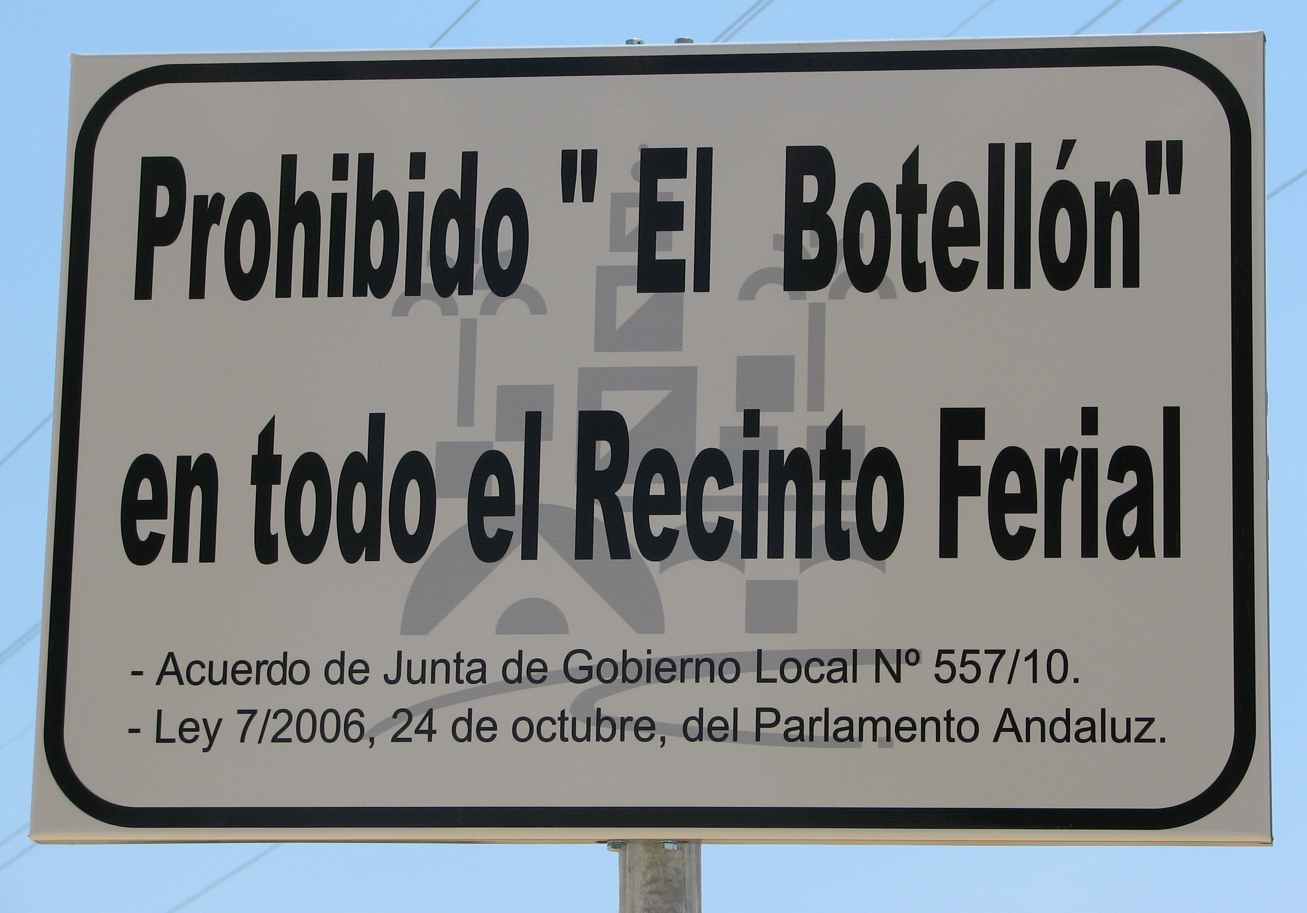 Schild Prohibido “El Botellón” en todo el Recinto Ferial in Córdoba